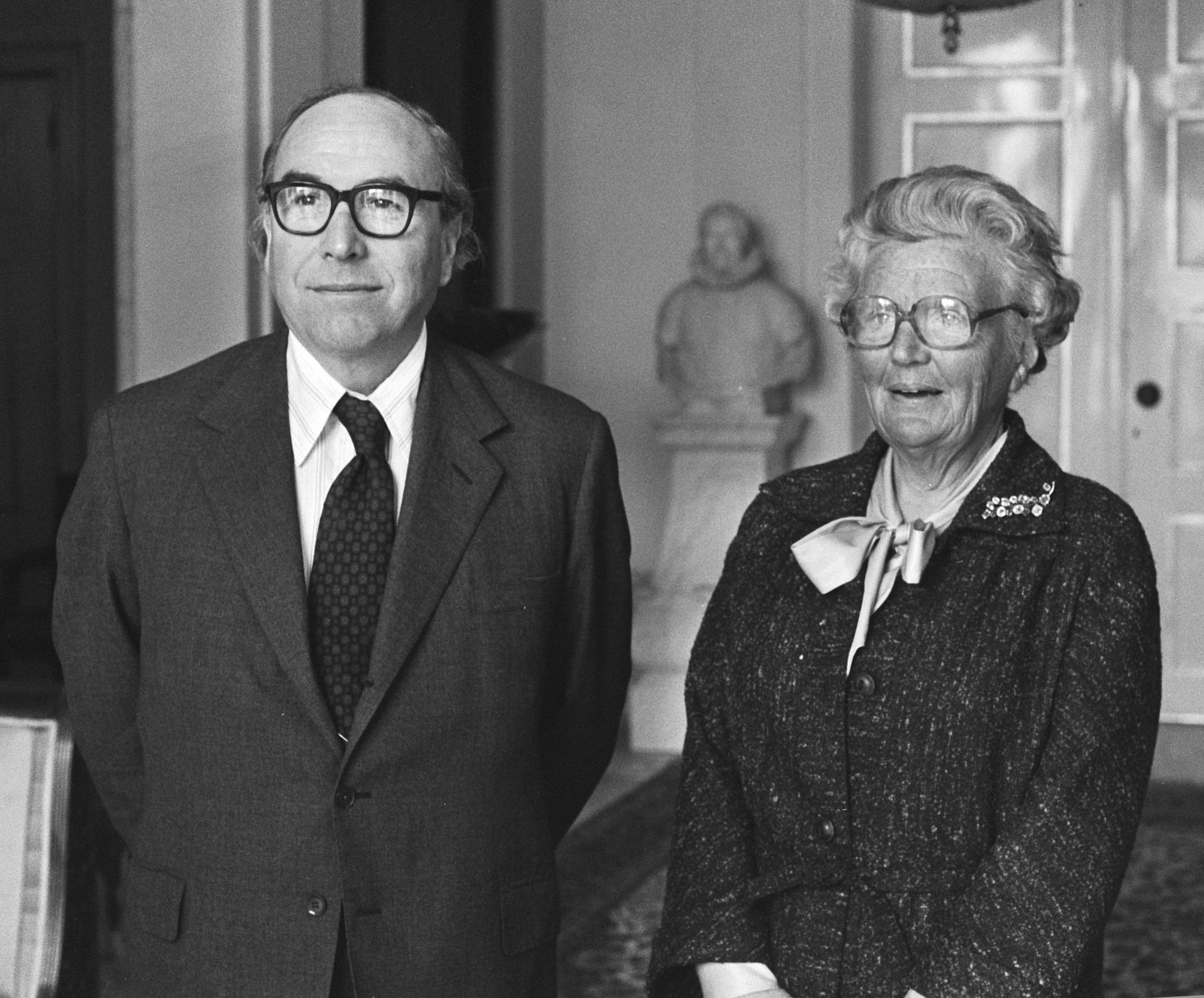 Koningin Juliana ontvangt Roy Jenkins (voorzitter Europese Commissie) op Paleis Soestdijk